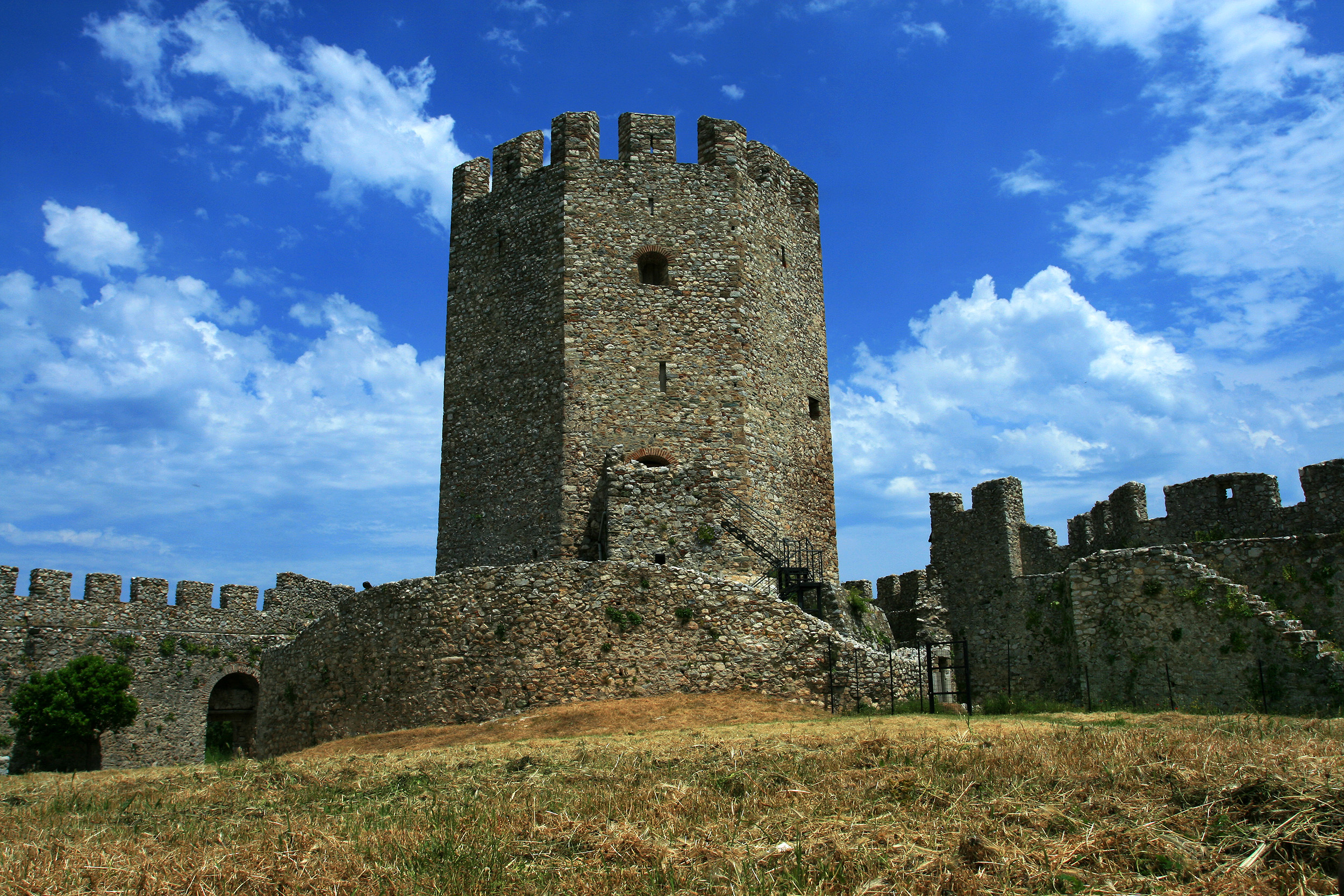 Κάστρο Πλαταμώνα«Κάστρο του Πλαταμώνα»